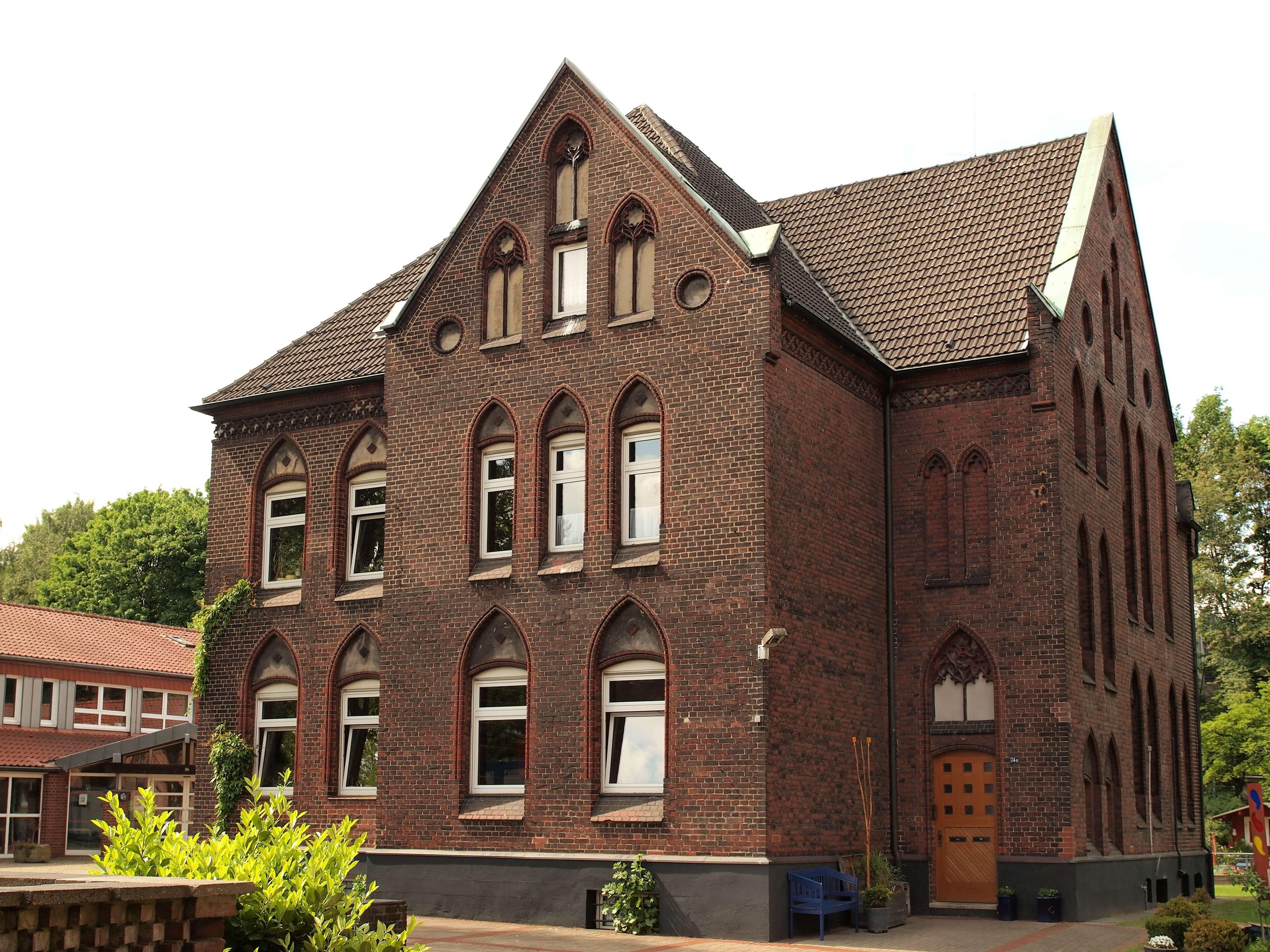 Herne, Bismarckstraße 74, Pastorat der Sankt Marien Gemeinde, Denkmal in Herne-Mitte (Baukau)